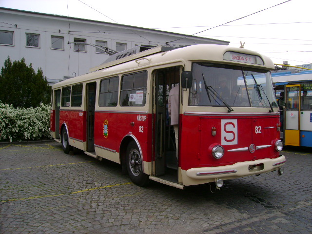 Škoda 9 Tr, vozovna trolejbusů, Ostrava